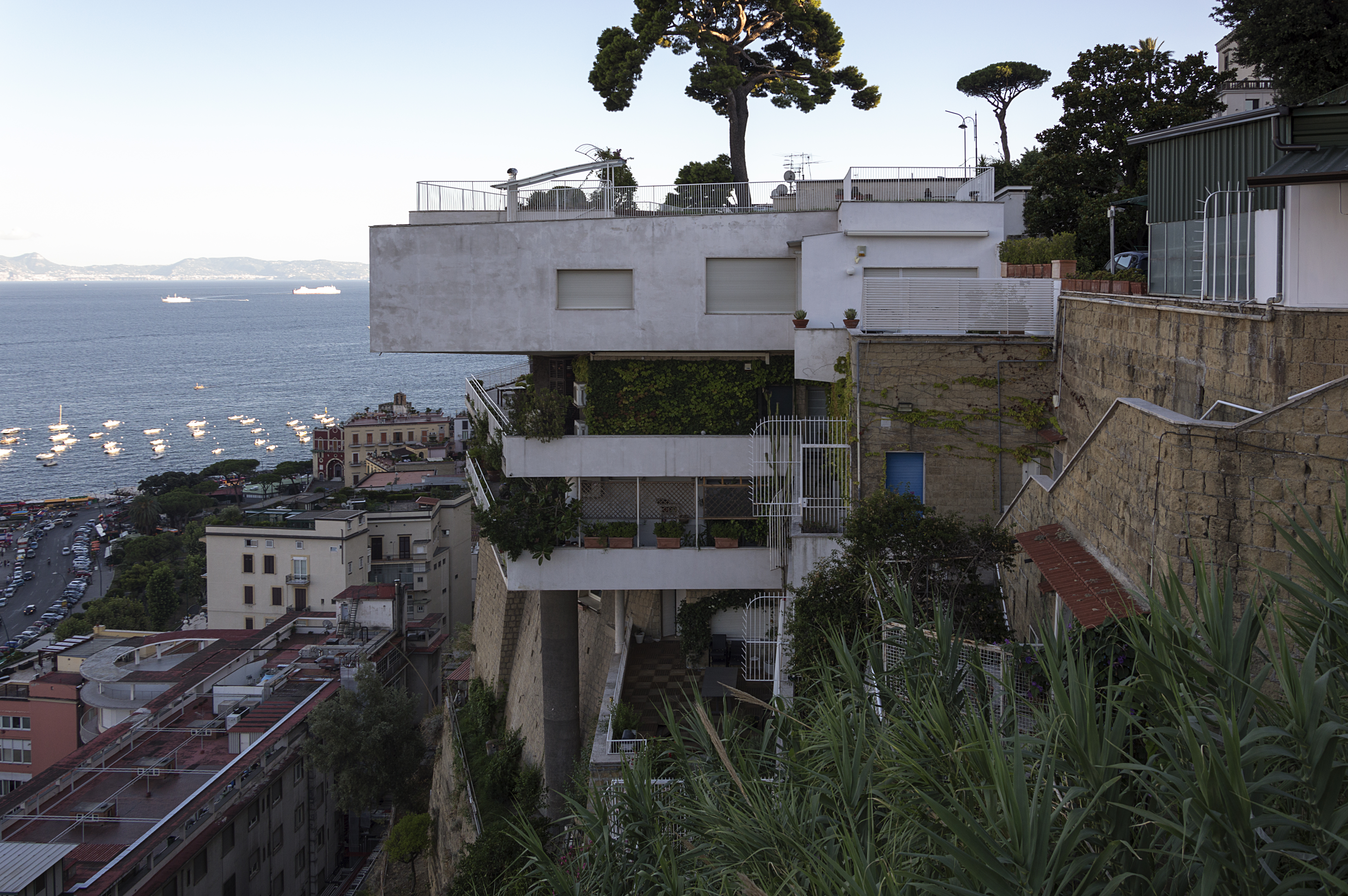 Villa Crespi, Davide Pacanowki